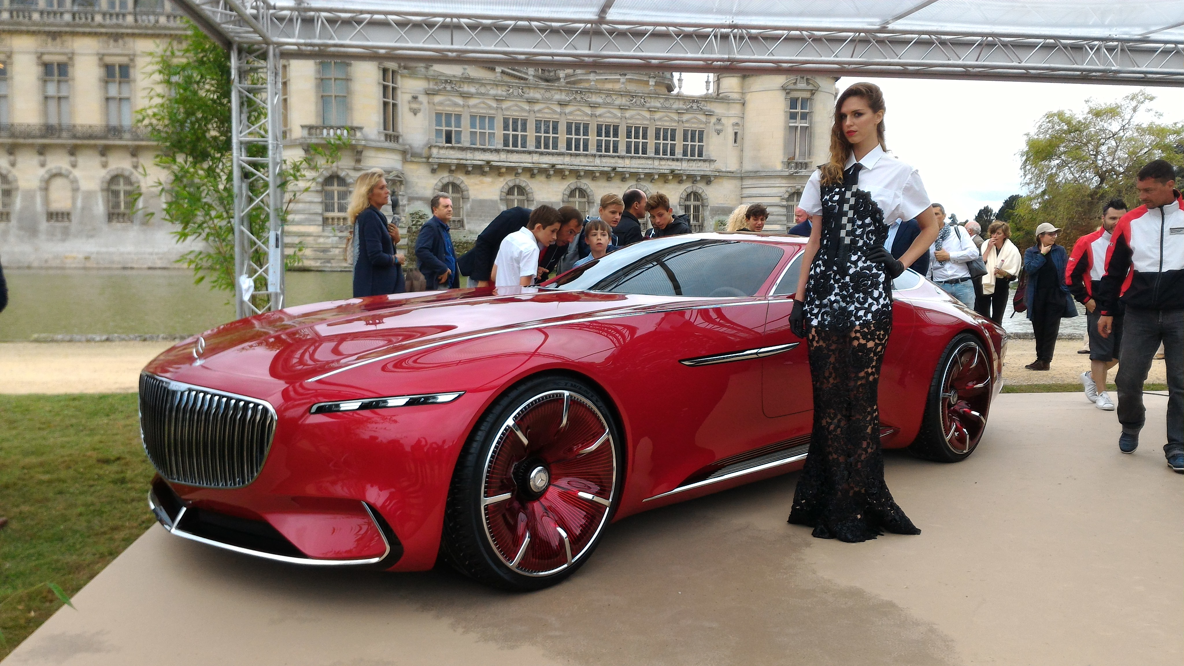 Mercedes Maybach Vision 6 Chantilly Arts & Elegance 2016